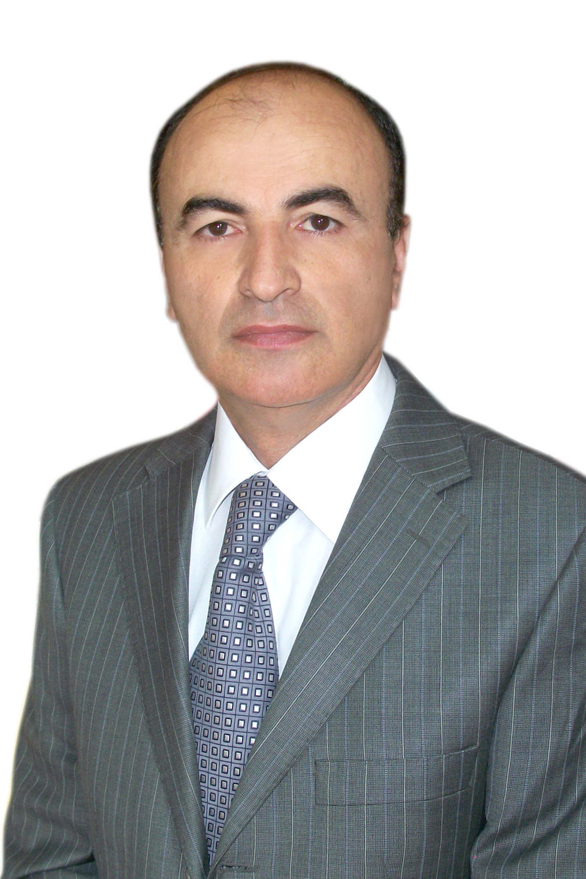 Əminağa Bəhmən oğlu Sadıqov — Azərbaycan Milli Elmlər Akademiyası Rəyasət Heyətinin Elmi-Təşkilat İdarəsinin rəisi, texnika elmləri doktoru, professor.